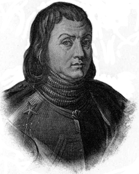 sujet: Jean II de Rieux licence: domaine public